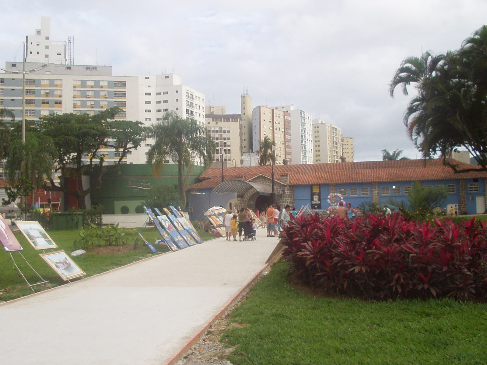 Santos.